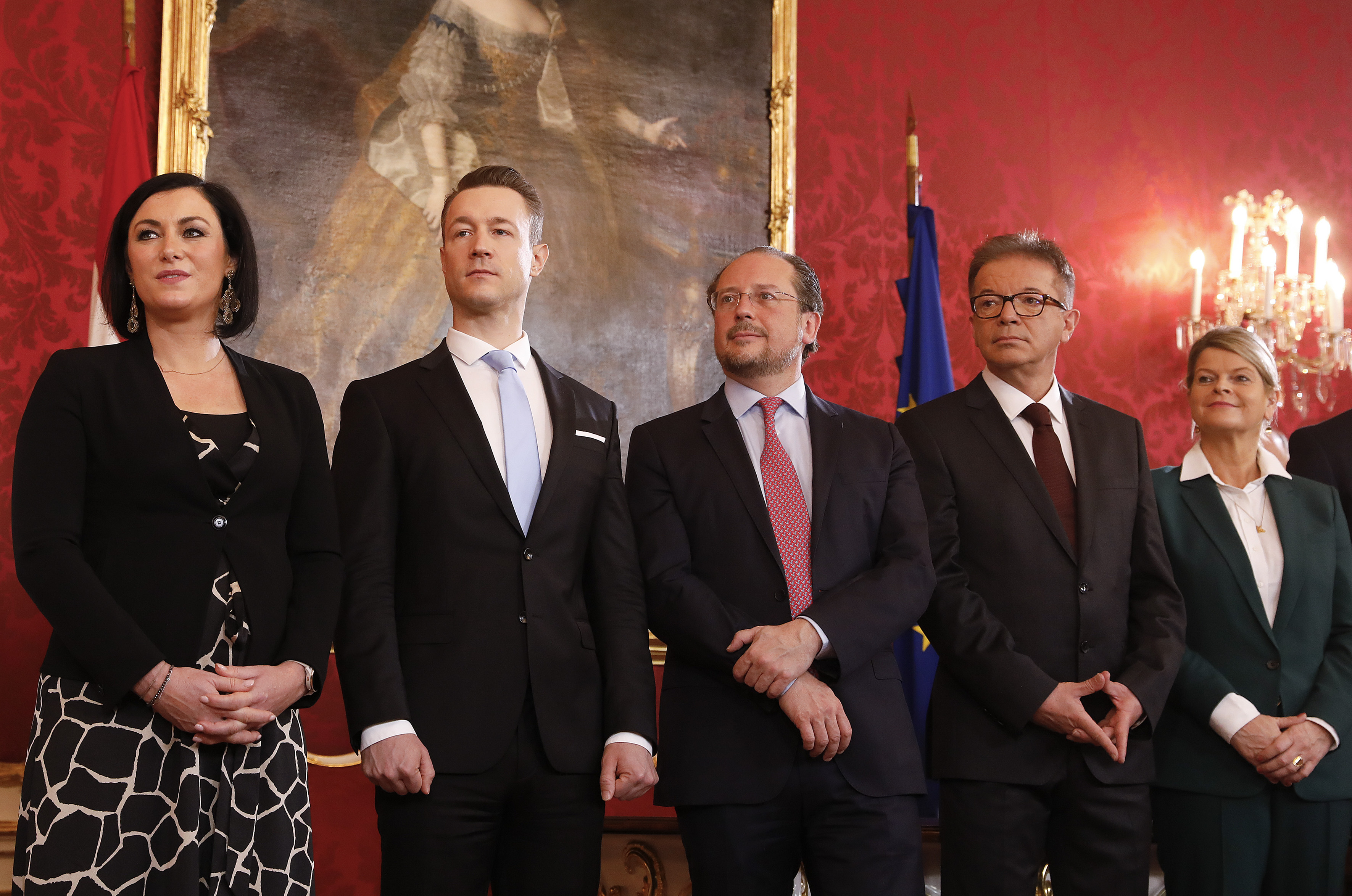 Angelobung der Bundesregierung Kurz II am 7. Januar 2020: Klaudia Tanner, Elisabeth Köstinger, Alexander Schallenberg, Rudolf Anschober, Gernot Blümel.